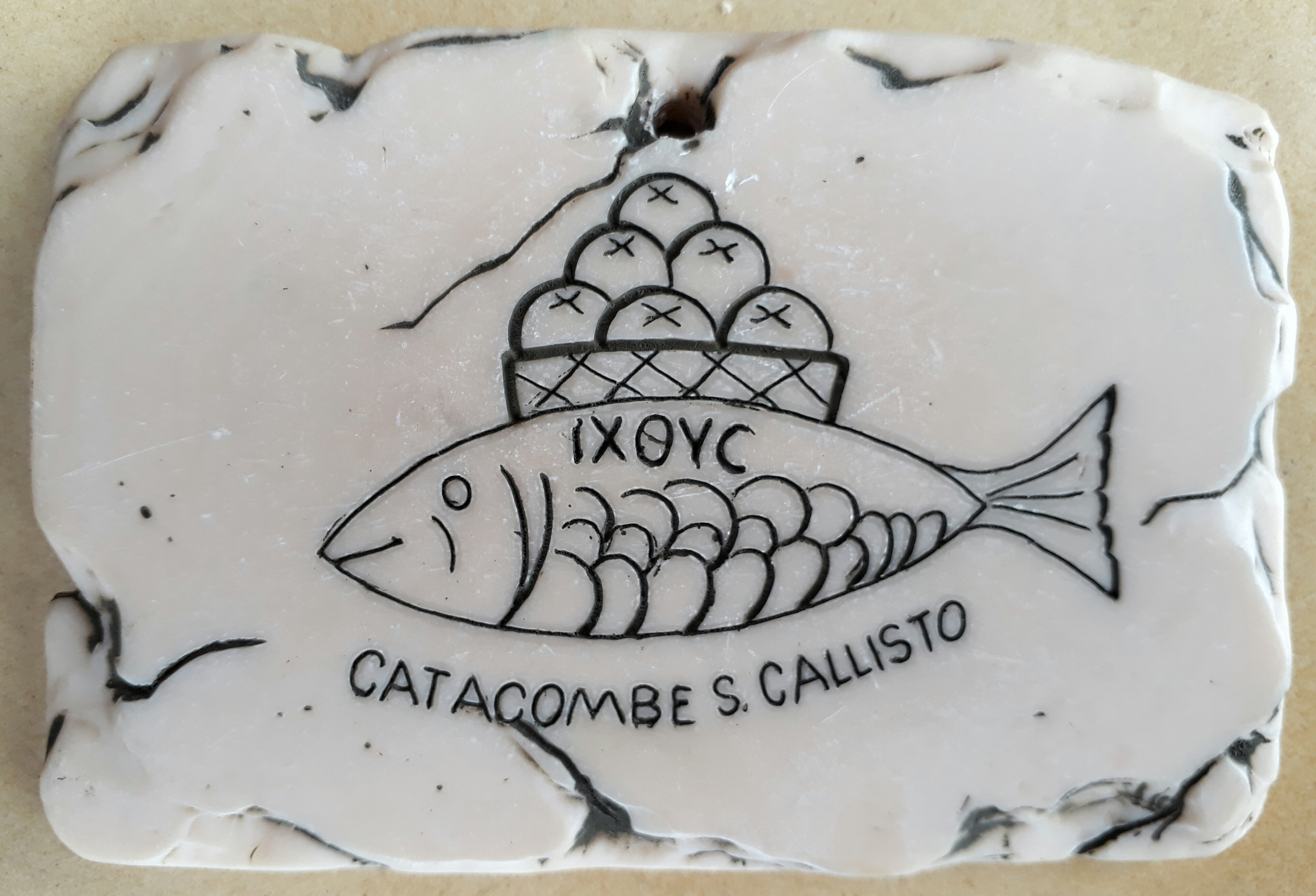 IXΘΥΣ Primeros símbolos de los cristianos: el pez y la canasta de panes. El acrónimo IXΘΥΣ se lee "ijtus" o "ichtus". Iota = I = Ἰησοῦς = Iesus (Jesús), Ji = X = Χριστὸς = Christos (Mesías, Ungido), Theta = Θ = Θεοῦ = Theou (de Dios), Ípsilon = Υ = Υἱὸς = Uios (Hijo), Sigma = Σ = Σωτήρ = Soter (Salvador). Iesús Jristós Ceú Yos Sotér, es decir "Jesús Cristo Hijo de Dios Salvador". El ichtus o ichthys (del griego ΙΧΘΥΣ ijcís "pez") es un símbolo que consiste en dos arcos que se intersecan de forma que parece el perfil de un pez a modo de una vesica pisciso mandorla horizontal, y que fue empleado por los primeros cristianos como un símbolo secreto. Presente de cerámica que compré en la Catacumba de San Calisto. Vía Appia Antica. Llegando a Roma. Enero del 2004.